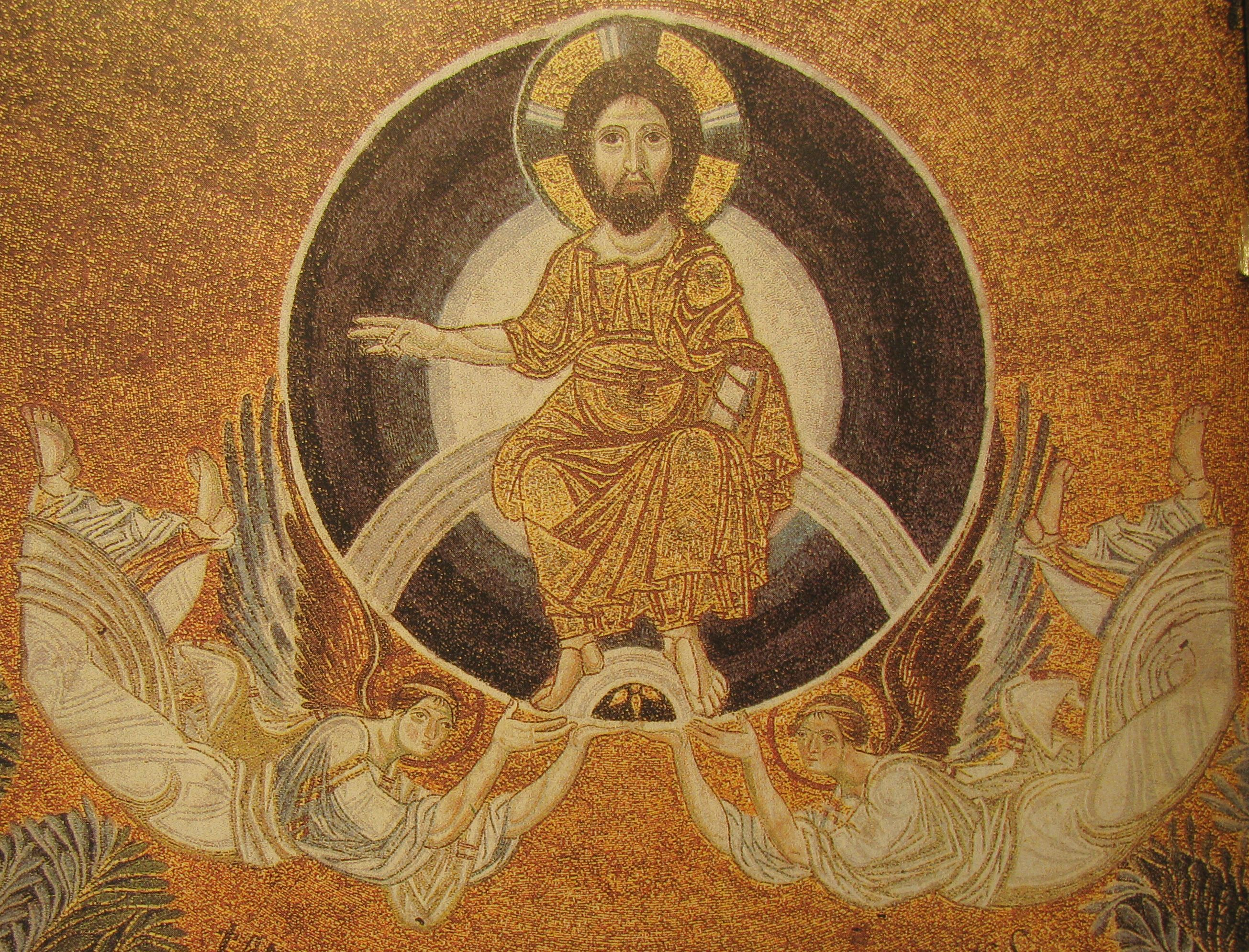 Вознесение Христово (деталь мозаики купола)